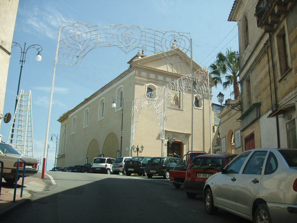 foto personale,Freccia Rocco.